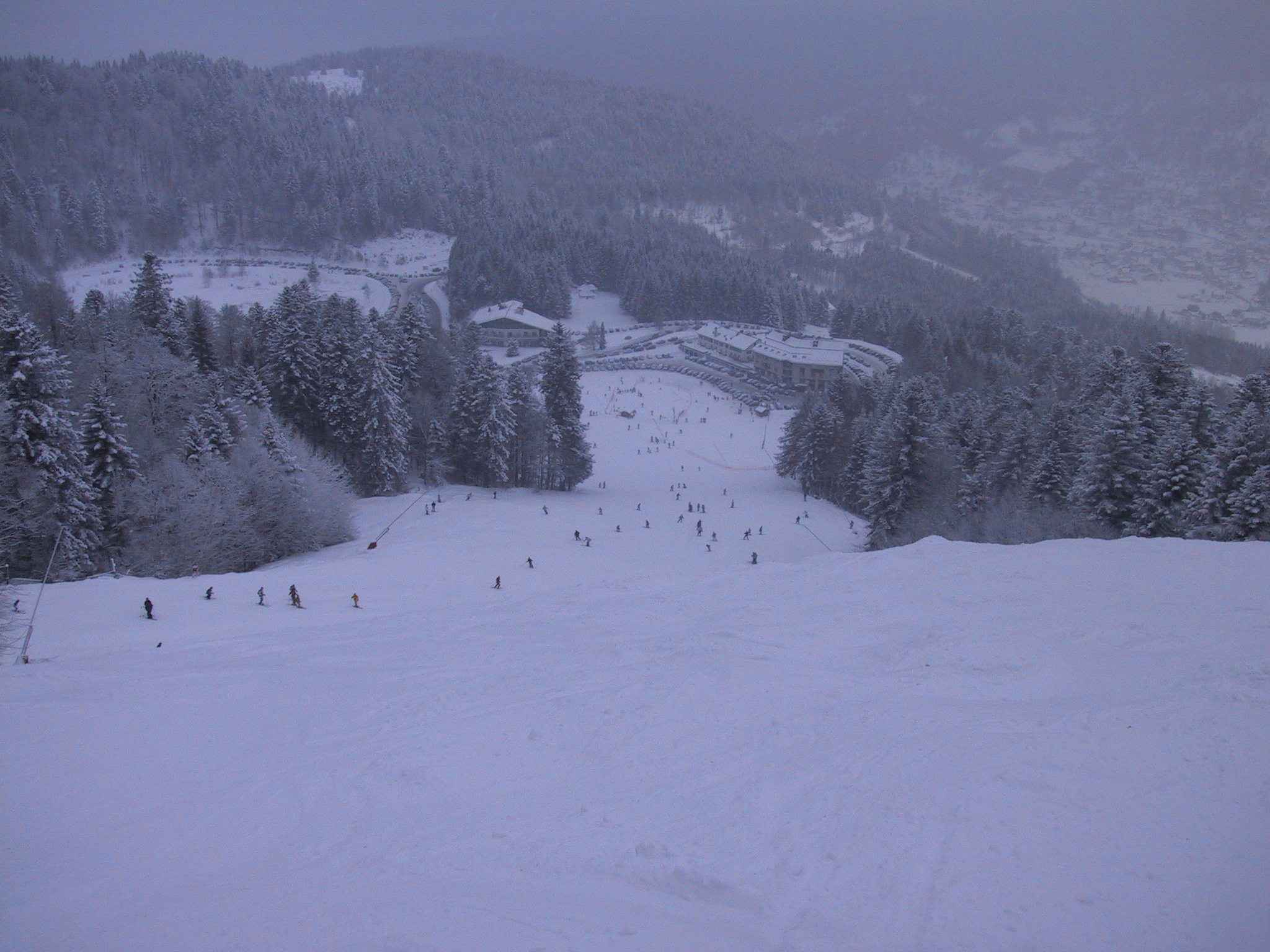 Ventron